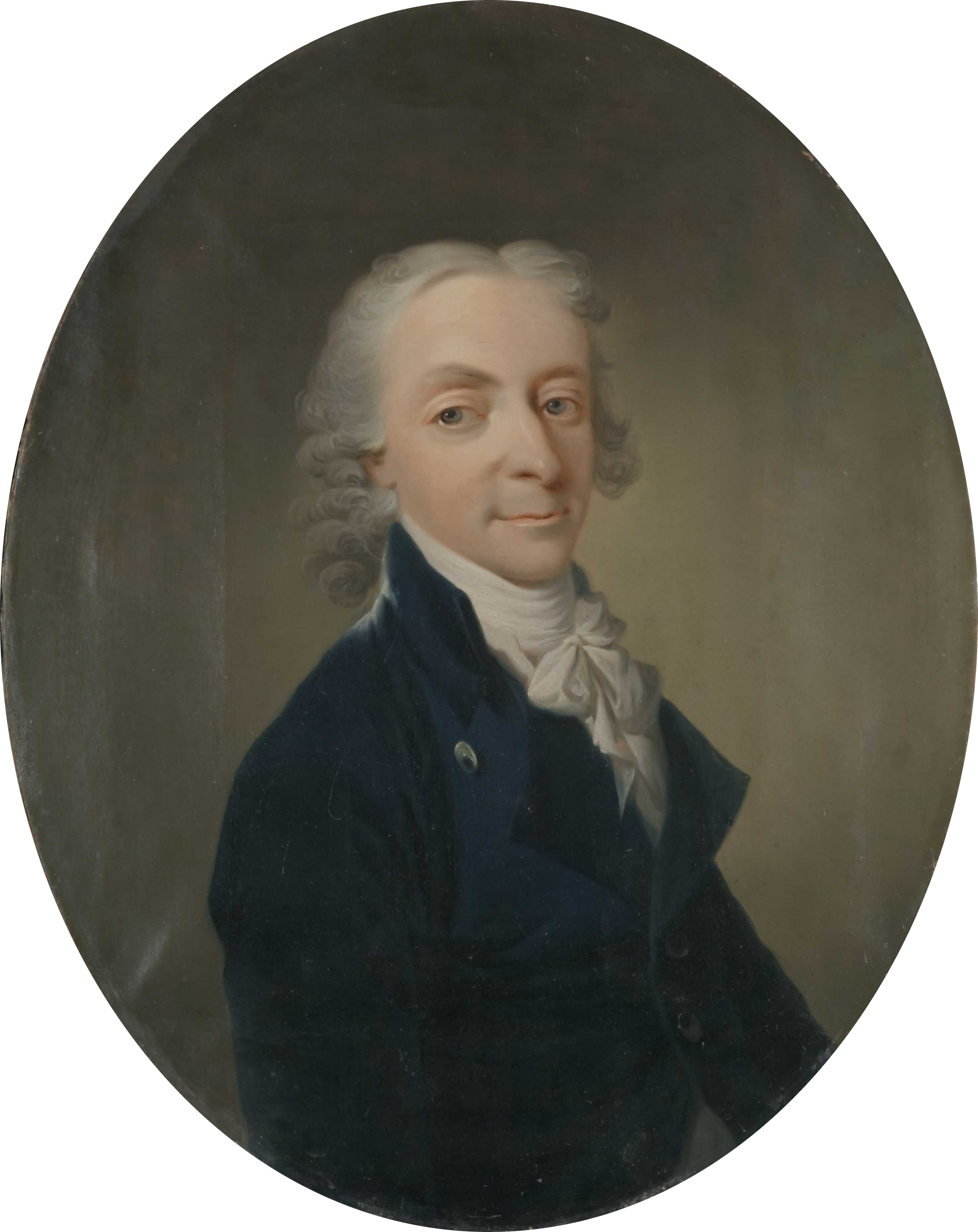 Portrett av Marcus Gjøe Rosenkrantz. Hoftebilde, hodet kvart høyre profil, kroppen 3/4 høyre profil. Hår grått med skill i midten, krøller ved ørene og i nakken. Øyne gråbrune, ansikt svak rosa. Gråhvitt høyt hakebind, knyttet i stor sløyfe med nedhengende ender. Vest i samme farge med opprettstående enkel krage og slag. Bakgrunnen gråbrun.